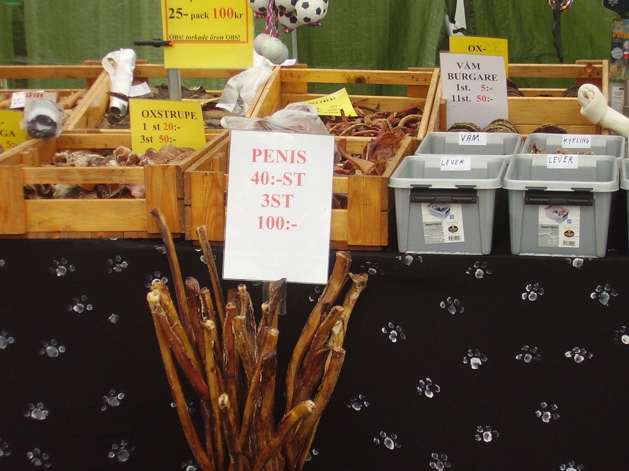 Exotiska varor på Oxhälja marknad i Filipstad 2006